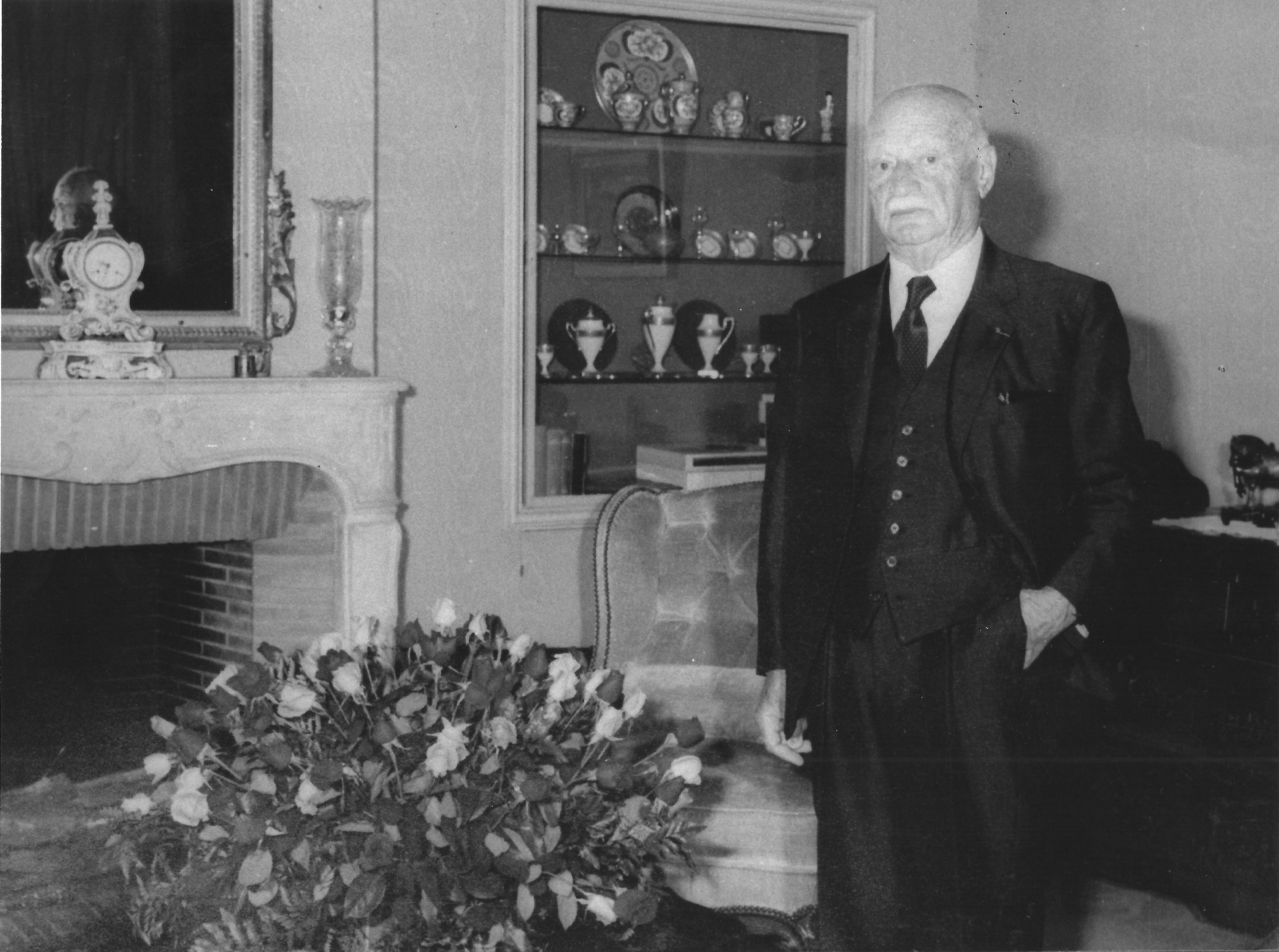 יוסף שידלובסקי היהמהנדס, ממציא ותעשיין מנועים צרפתי-יהודי, יליד פולין, שפעל בצרפת ואחר כך בישראל.